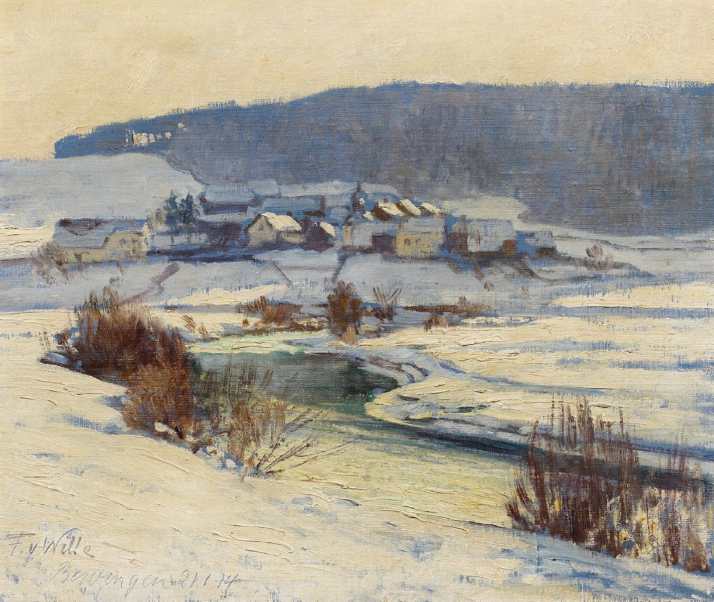 Winter in Bewingen. Signiert und datiert unten links: F.v. Wille Bewingen 21.1.14. Öl auf Leinwand. 46,5 x 55 cm